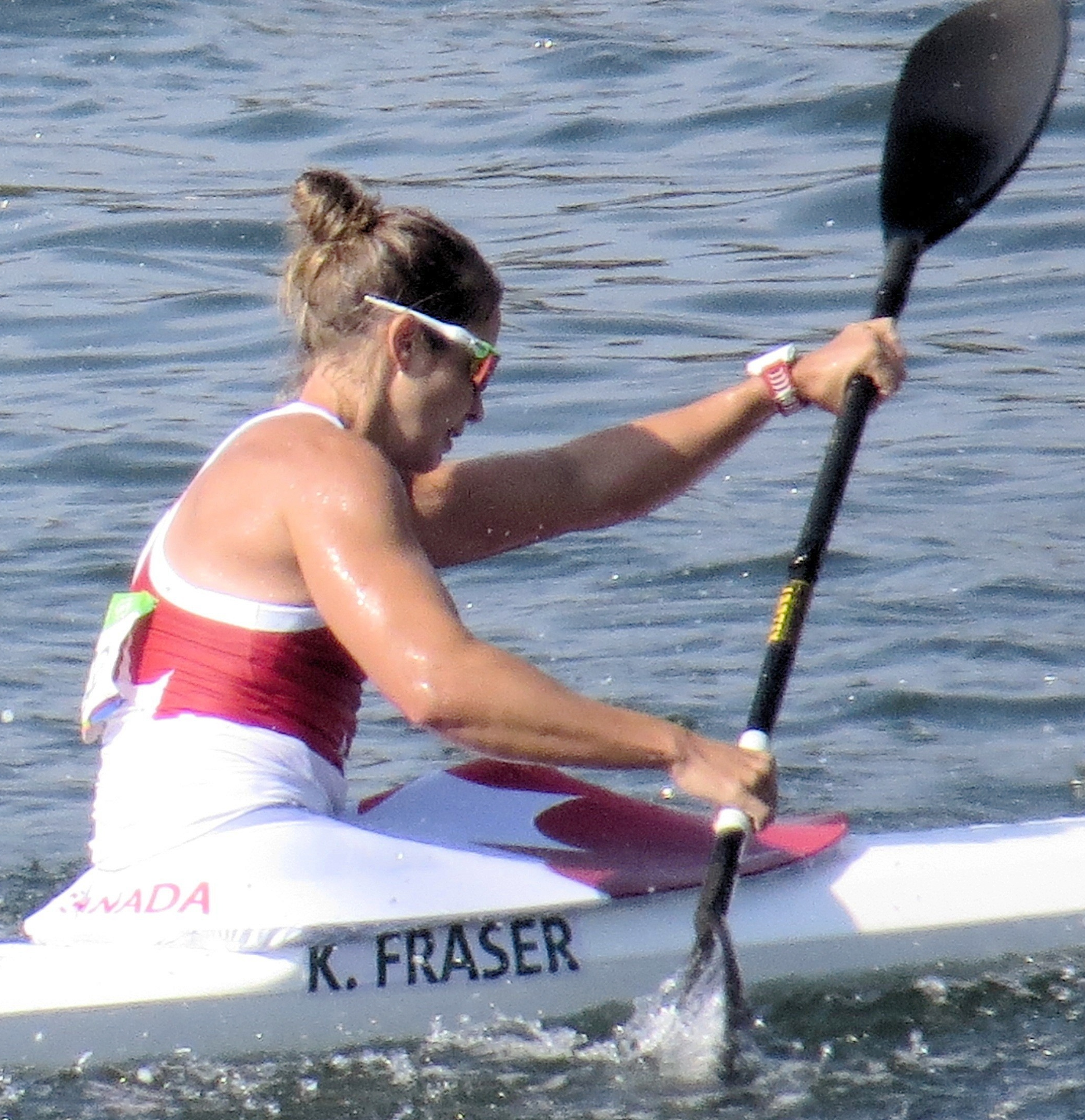 Sx50